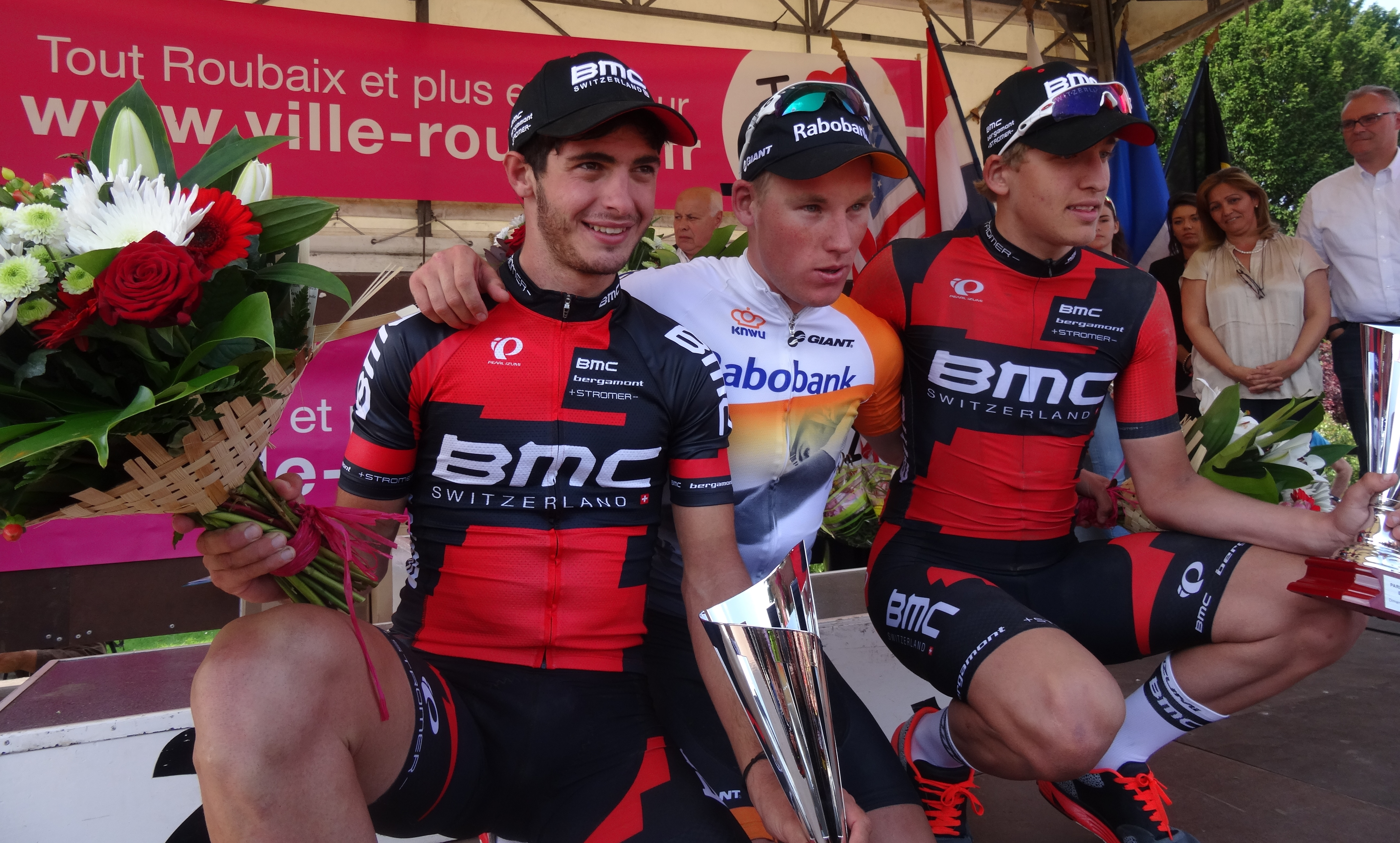 Reportage réalisé le dimanche 1er juin à l'occasion de l'arrivée du Paris-Roubaix espoirs 2014 au vélodrome André-Pétrieux à Roubaix, Nord, Nord-Pas-de-Calais, France.